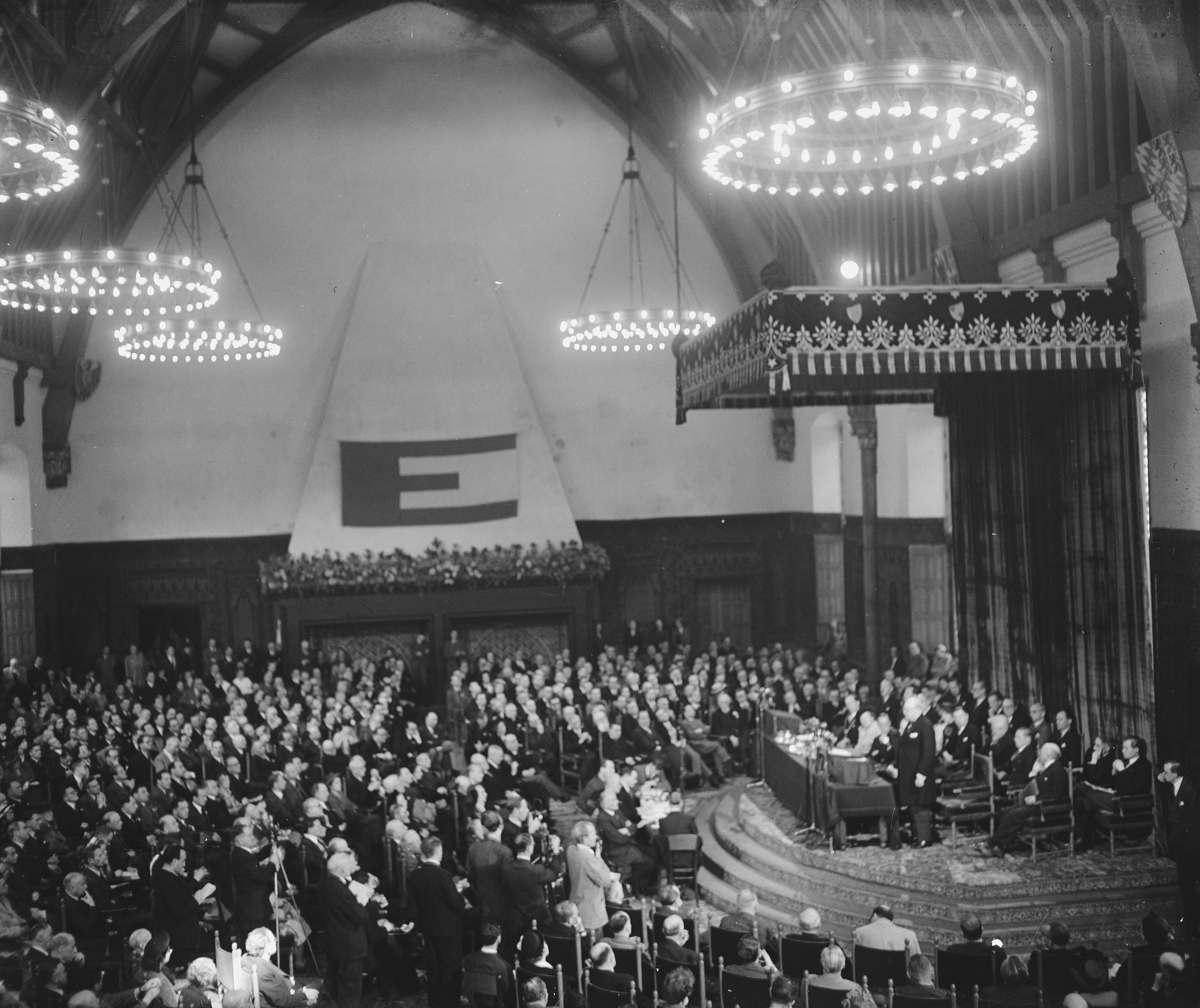 Collectie / Archief : Fotocollectie Anefo Reportage / Serie : [ onbekend ] Beschrijving : Europa Congres Ridderzaal Den Haag. Overzicht Datum : 9 mei 1948 Locatie : Den Haag, Zuid-Holland Trefwoorden : congressen, overzichten Instellingsnaam : Ridderzaal Fotograaf : Snikkers, […] / Anefo Auteursrechthebbende : Nationaal Archief Materiaalsoort : Glasnegatief Nummer archiefinventaris : bekijk toegang 2.24.01.09 Bestanddeelnummer : 902-7379